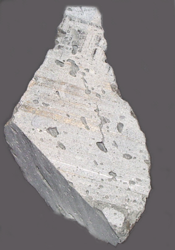 Mondgestein (Lunar sample Nr. 76015, 143 (333 g)) im Deutschen Technik Museum Berlin, etwa vier Milliarden alt, während der Apollo 17 Mission auf dem Mond eingesammelt